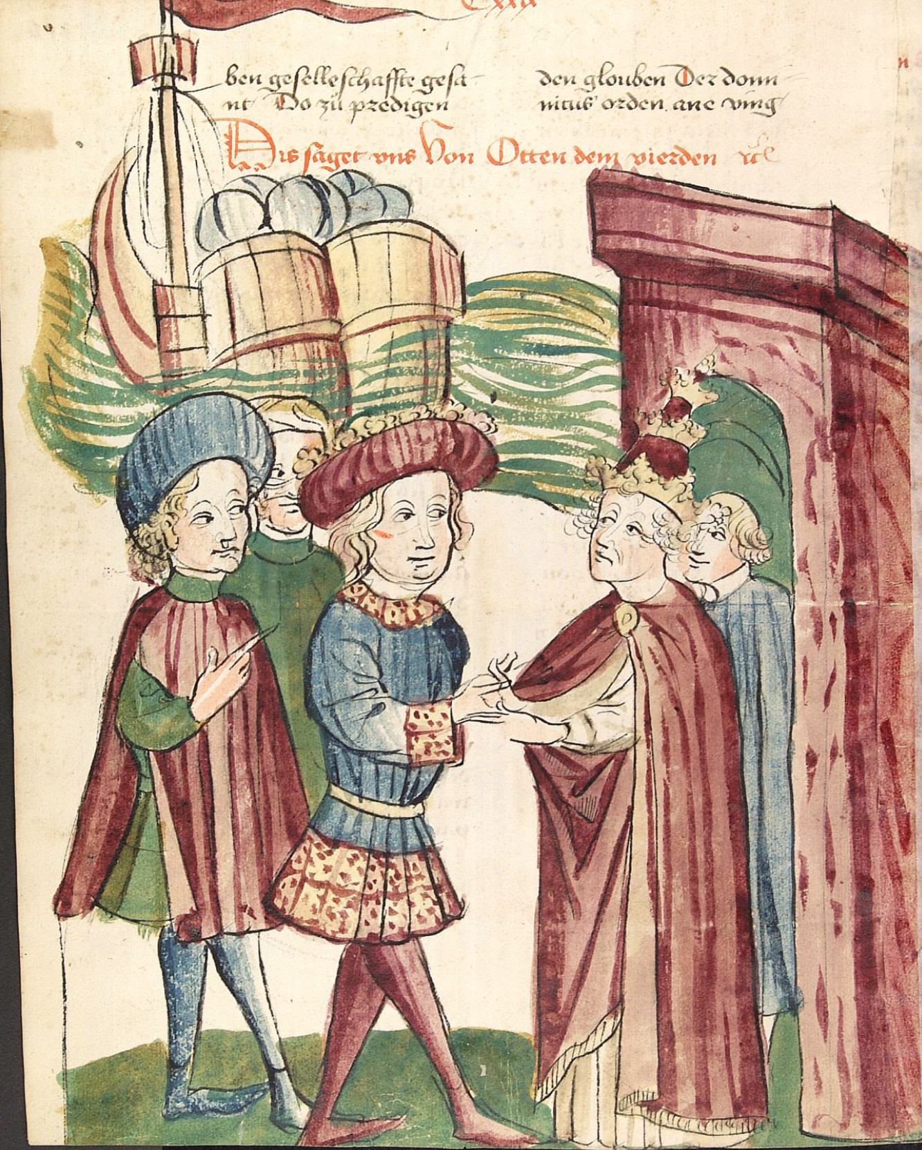 Otto IV. und Papst Innocenz III. reichen sich vor den ankommenden Schiffen Friedrichs II. die Hände Werkstatt des Diebold Lauber, unbekannter Künstler Zeichnung (ganzseitig), ungerahmt, Feder & koloriert, Wasserfarbe & Deckfarbe Kaiser Otto IV., der sich in Begleitung zweier Höflinge befindet, und Papst Innozenz III., der in Begleitung eines Kardinals unter einem Stadttor steht, reichen sich beide Hände. Die Darstellung des Vordergrundes dürfte sich somit auf den Romzug Ottos IV. 1209 beziehen. Im Hintergrund nähert sich aber bereits ein Schiff mit den Truppen Friedrichs II., der erst 1212 gegen Otto IV. aufbrach. Die Hände des Papstes und der Bildmittelgrund blieben unvollendet.